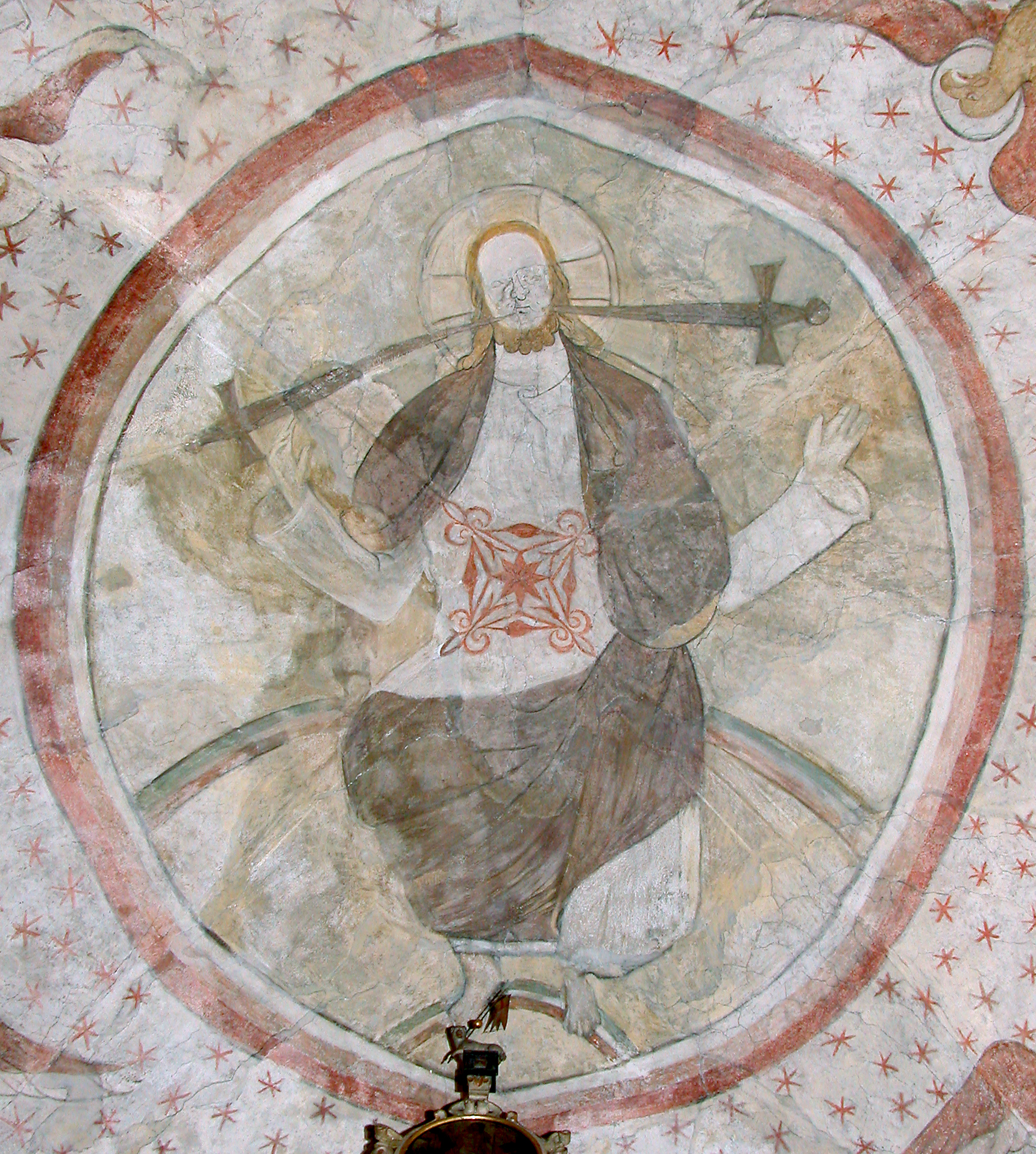 03.08.2007 01662 Meißen-Zscheila, Werdermannstraße 25 (GMP: 51.171379,13.491264): Trinitatiskirche Zscheila. Zwischen 1240 und 1260 wurde die vorher niedrigere Kapelle auf dem heutigen Altarraum und die Vierung davor erweitert. Aus dieser Zeit stammen auch die erst 1938 wiederentdeckten Fresken. Das Hauptfresko im Altarraum zeigt Christus als Weltenherrscher. [DSCN28828.TIF]20070803035DR.JPG(c)Blobelt